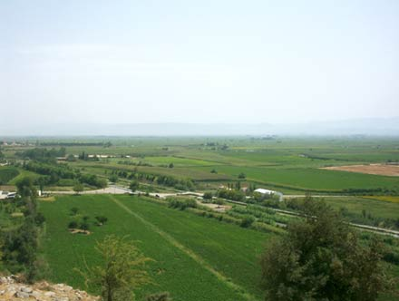 Blick auf die Mäander-Ebene